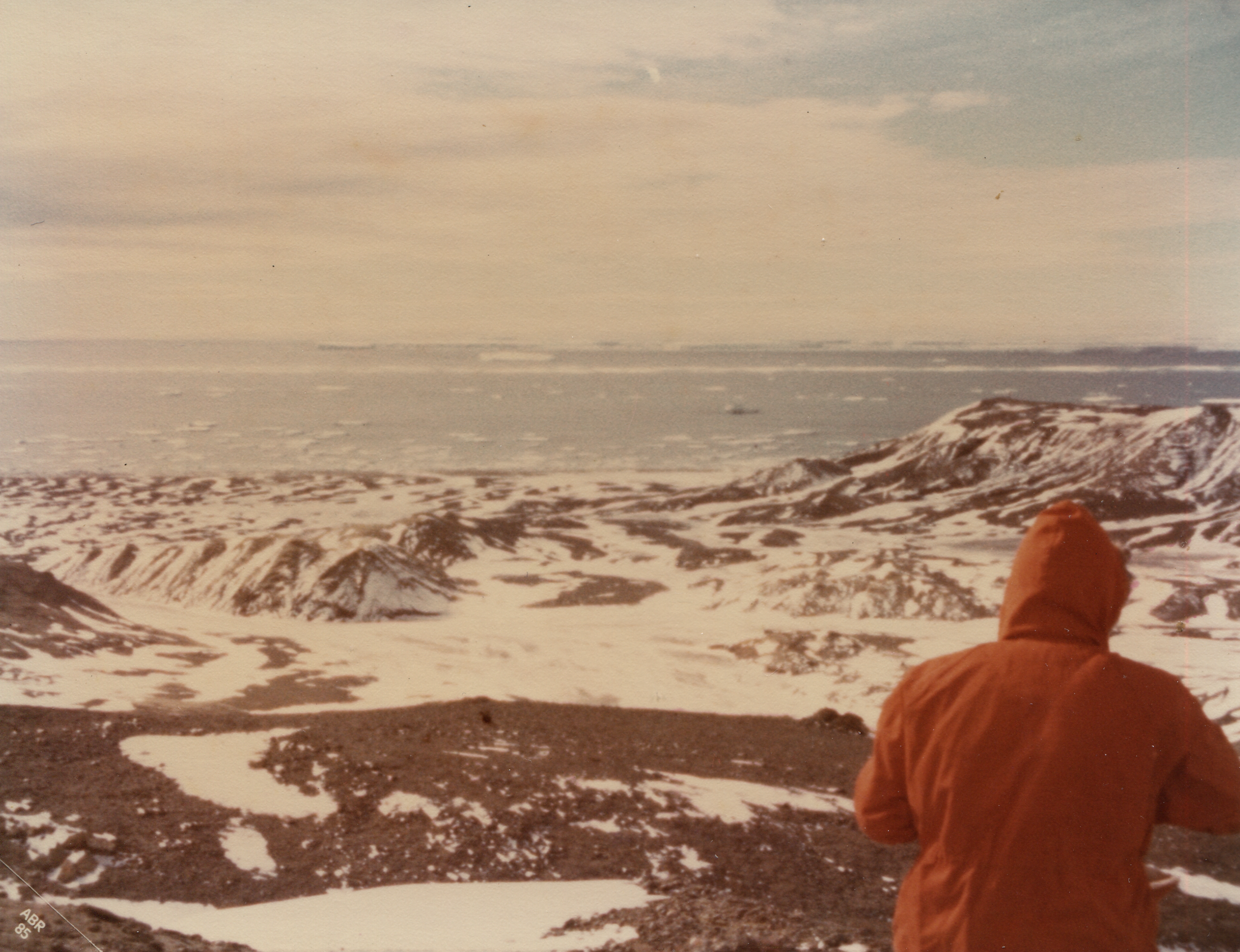 Arribo de la Expedición Antártica de 1984-1985